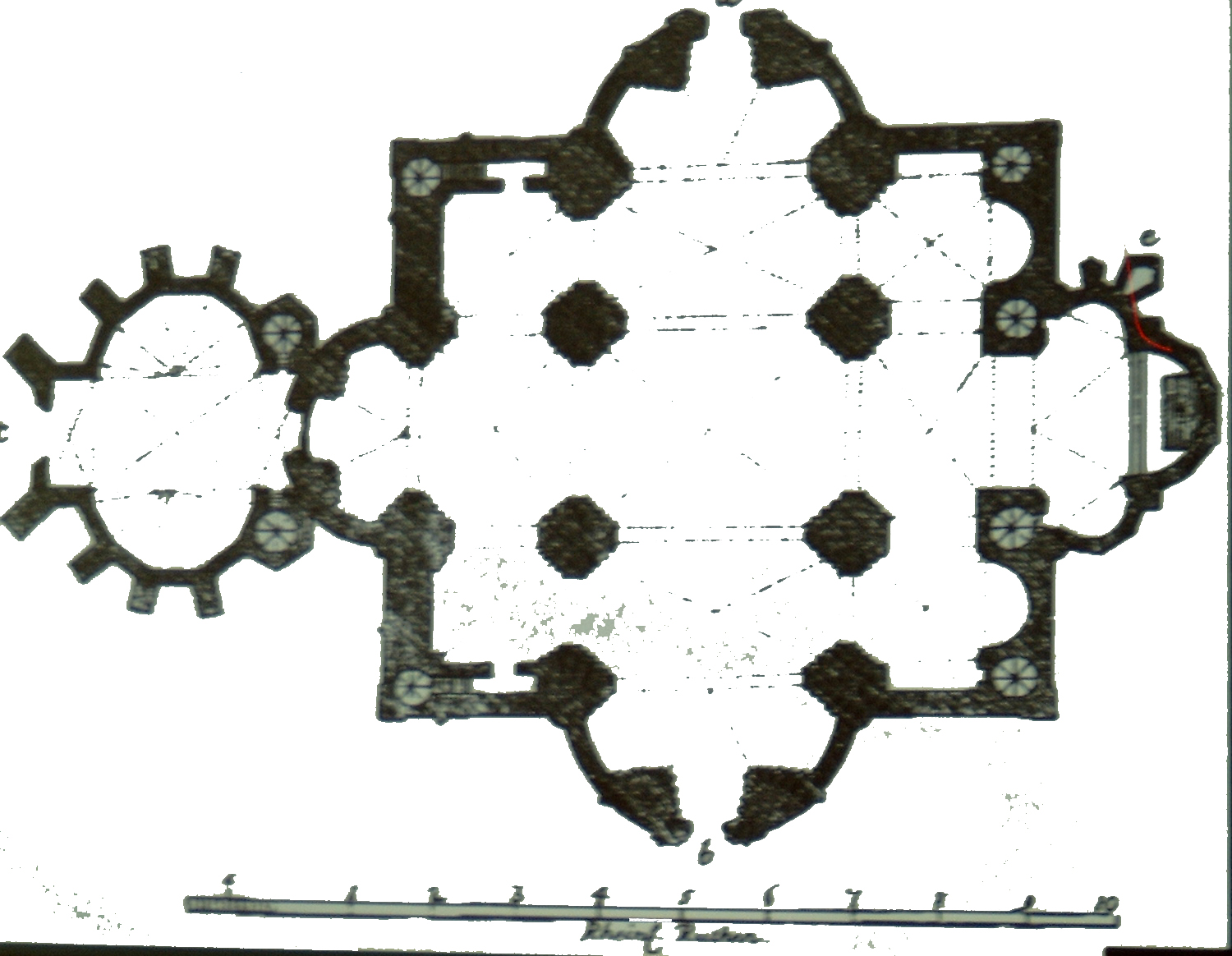 Marienkirche, Aufriß aus dem 19.Jhrhndrt